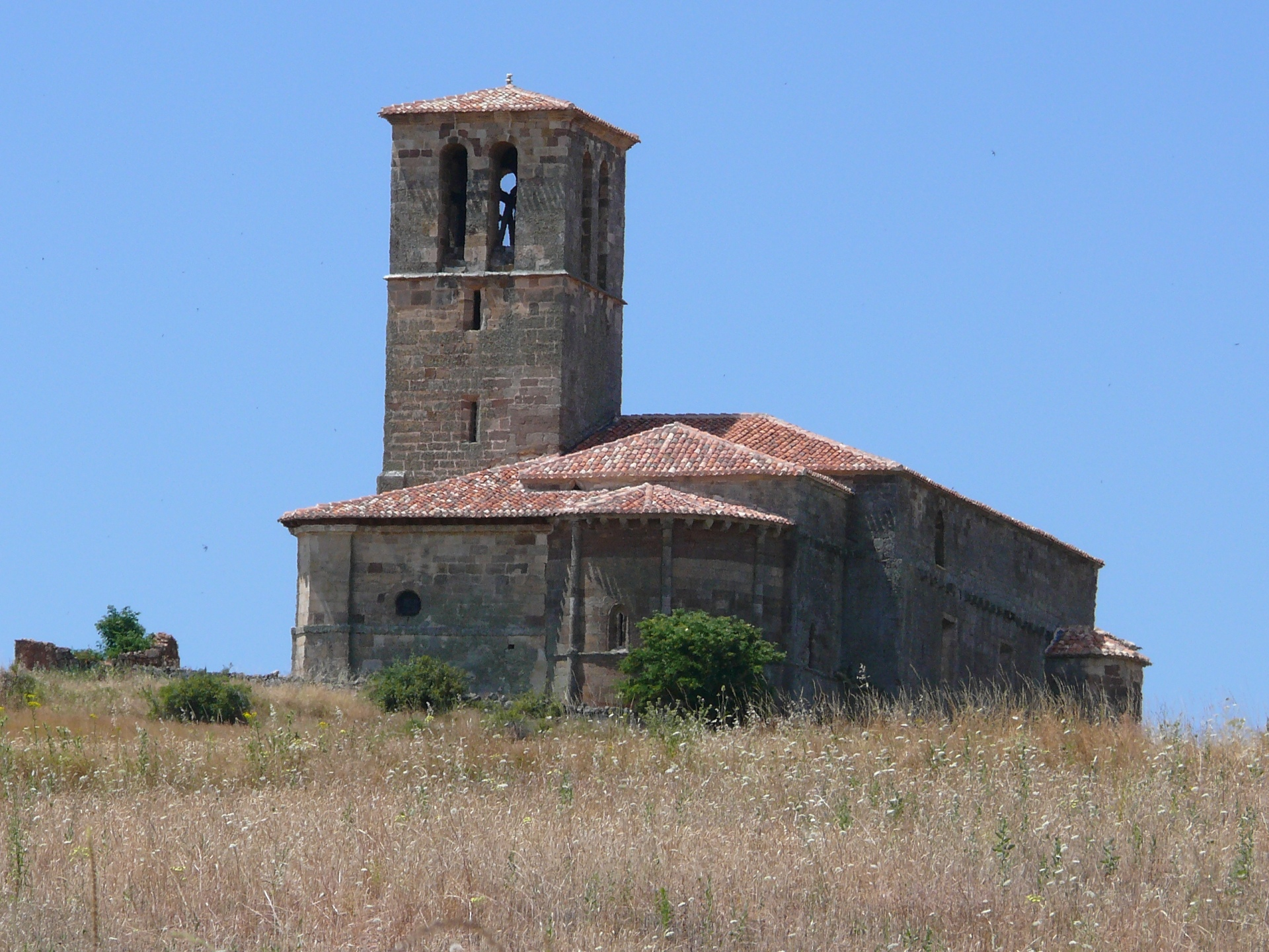 Iglesia Parroquial Nuestra Señora de la Natividad